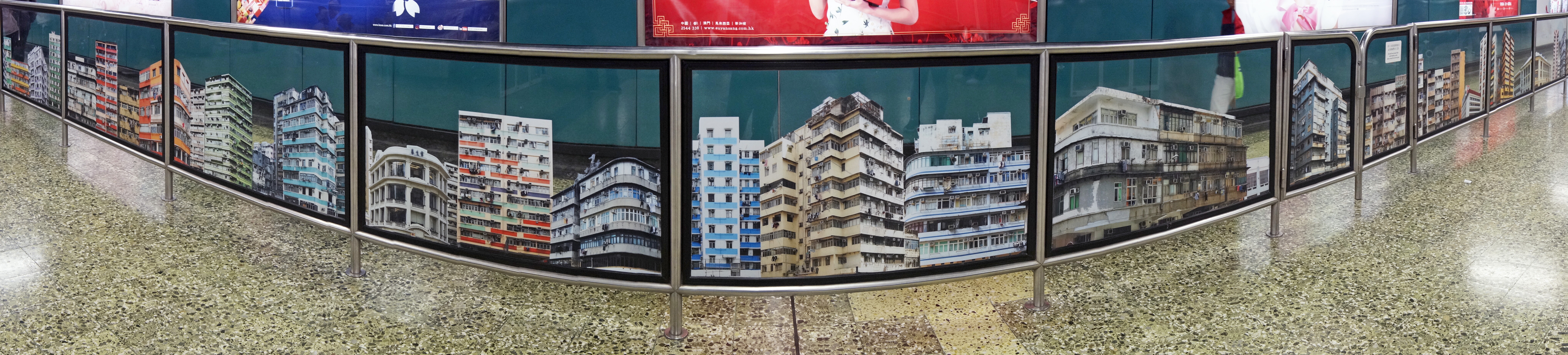 港鐵深水埗站藝術品